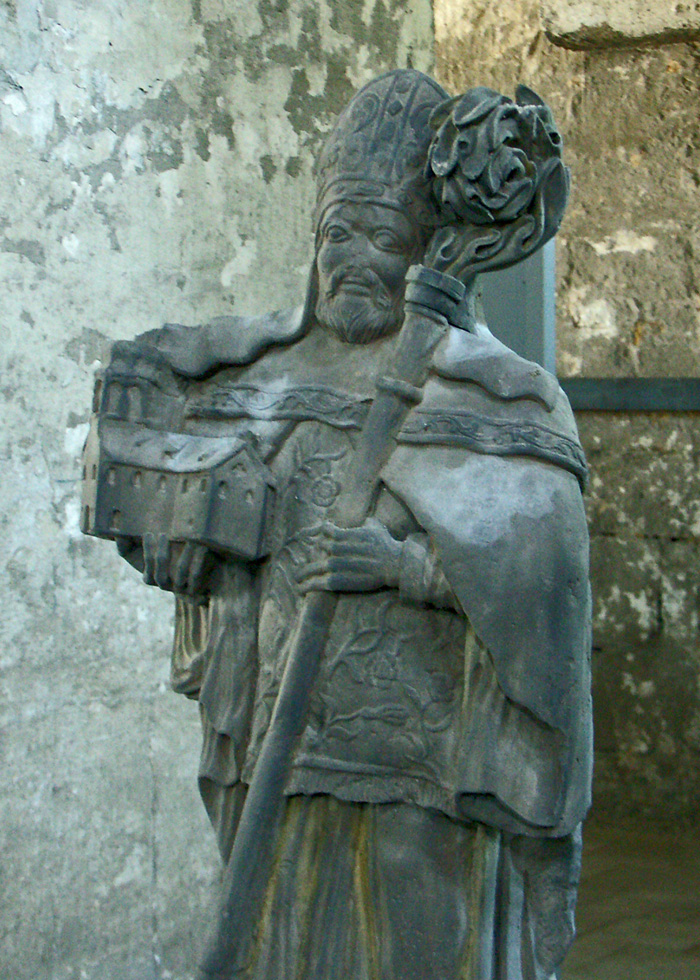 Bronzeplastik von Bischof Burchard I. in der St. Burchardi-Kirche in Halberstadt